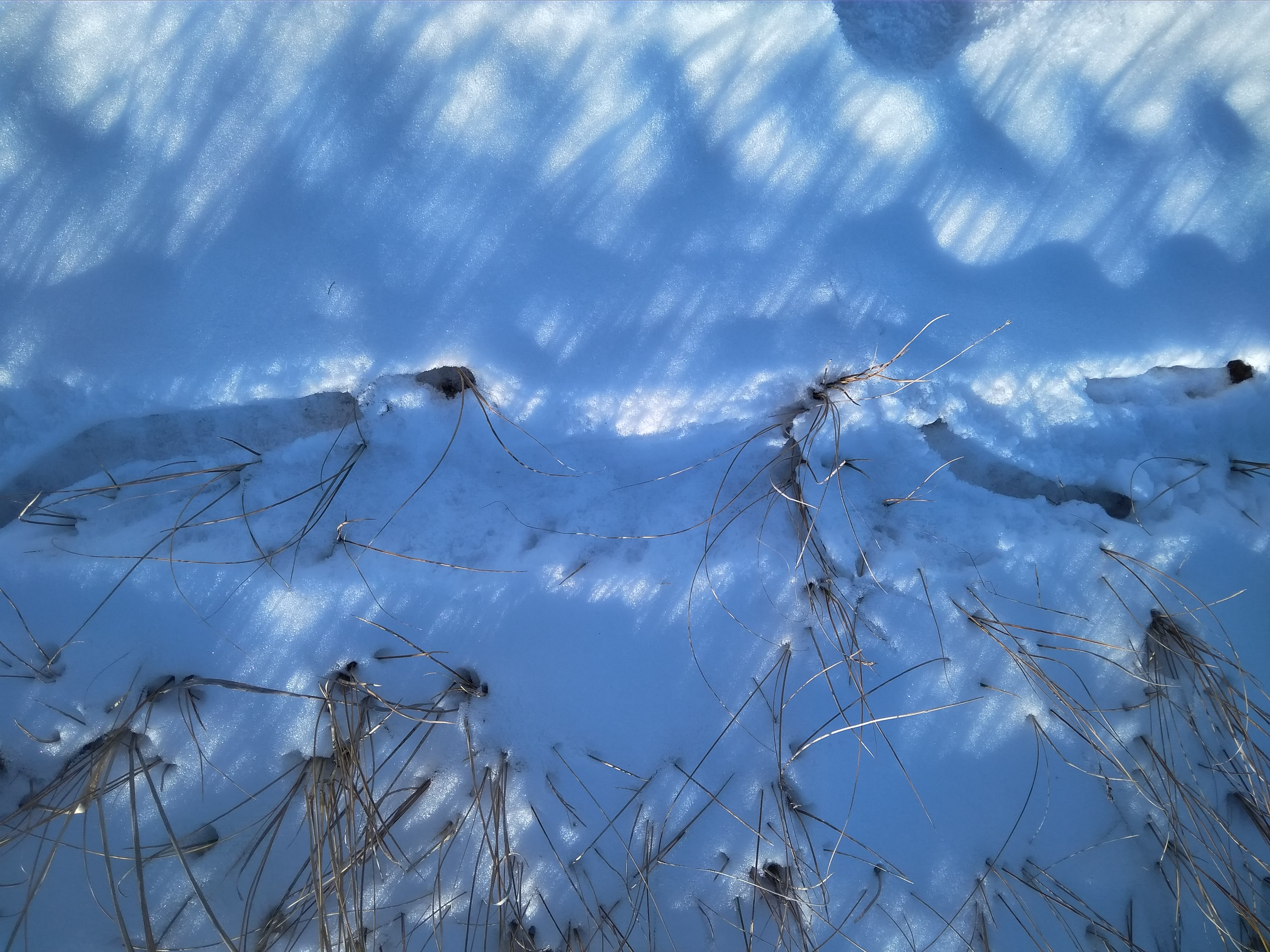 Знято смартфоном у полі